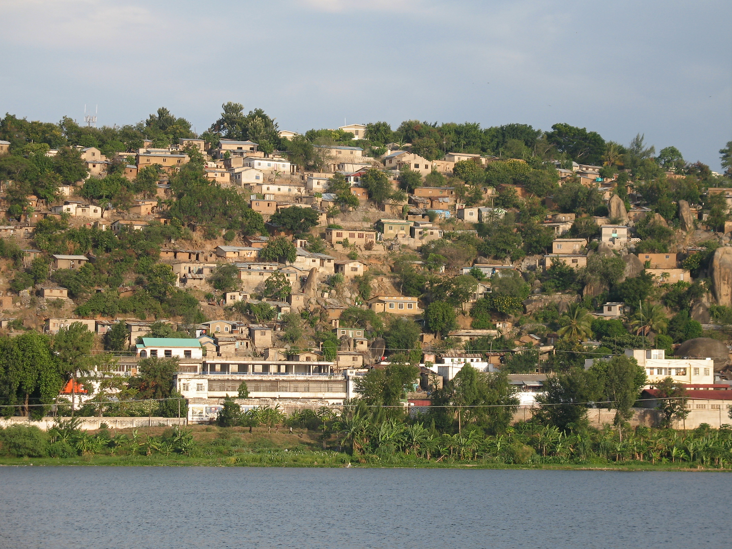 Mwanza city